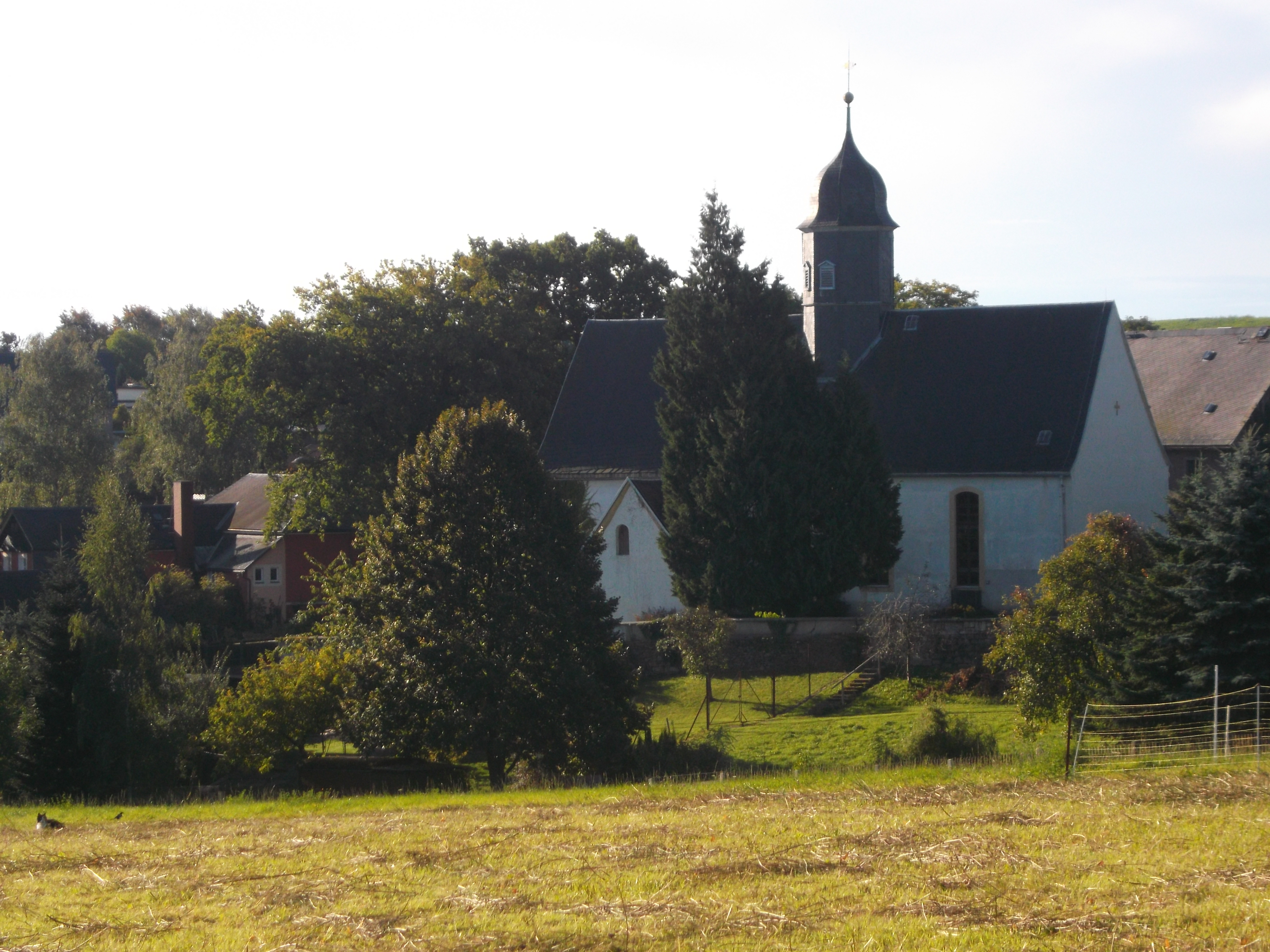 Kirche Seifersdorf bei Dippoldiswalde Ansicht Friedhof